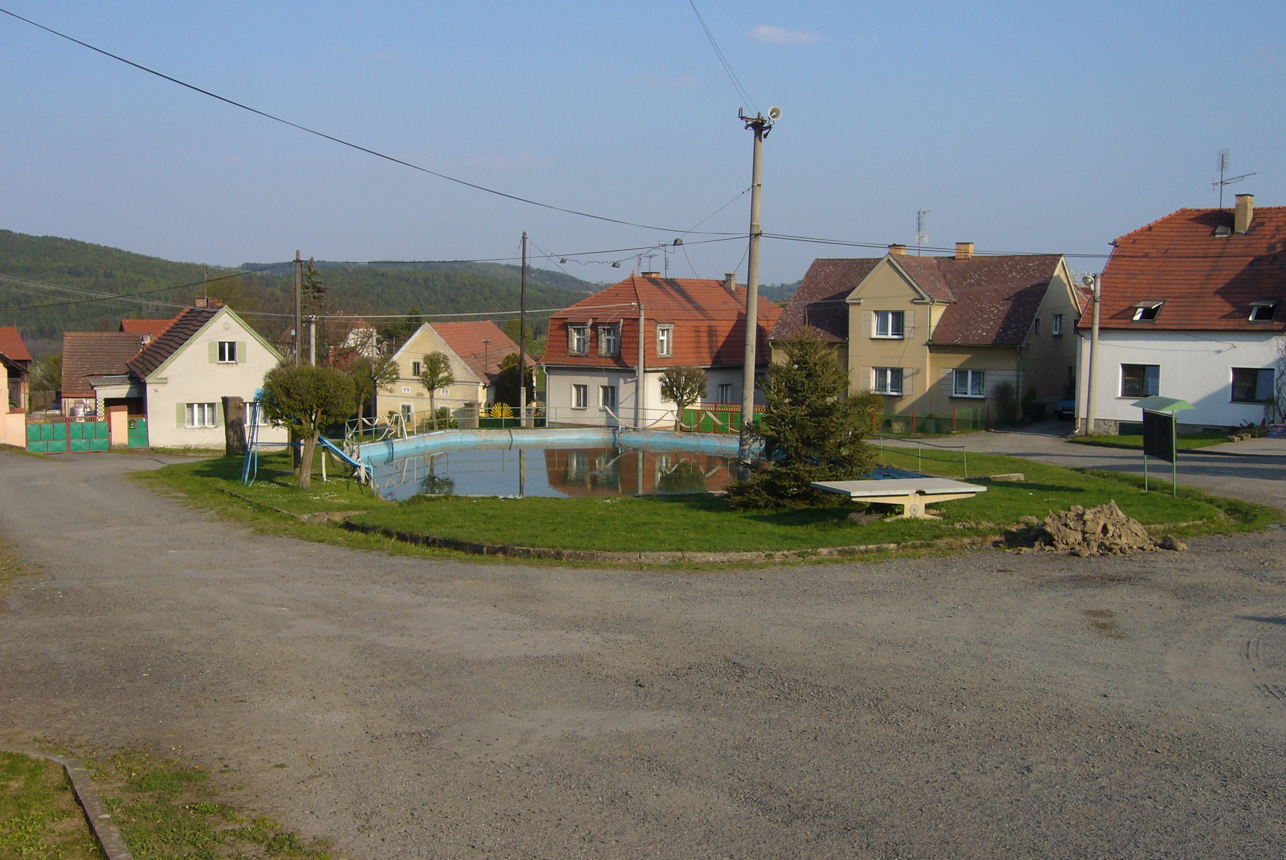 Chrášťovice – náves